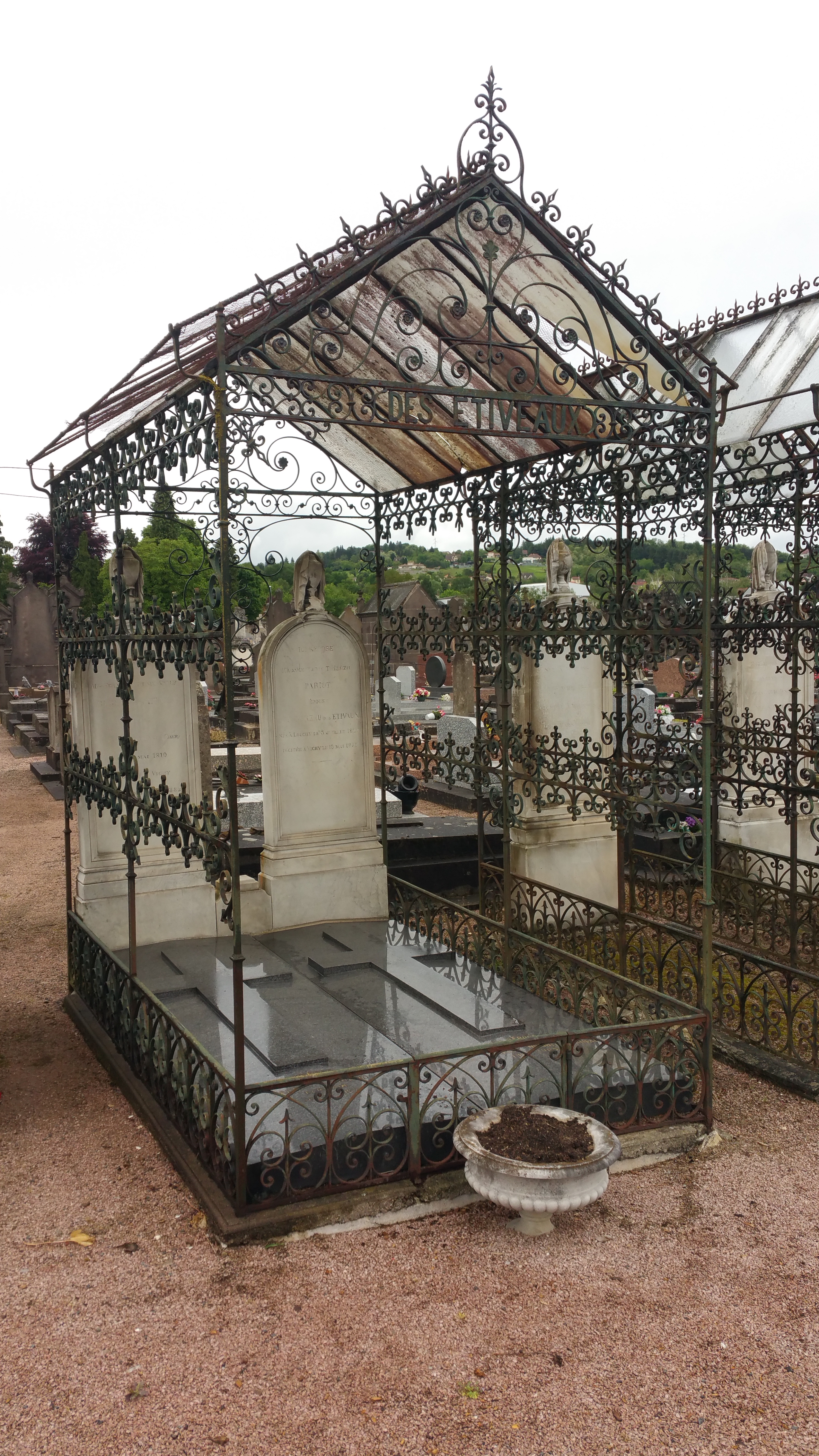 Tombe de Valery Larbaud au cimetière de Vichy